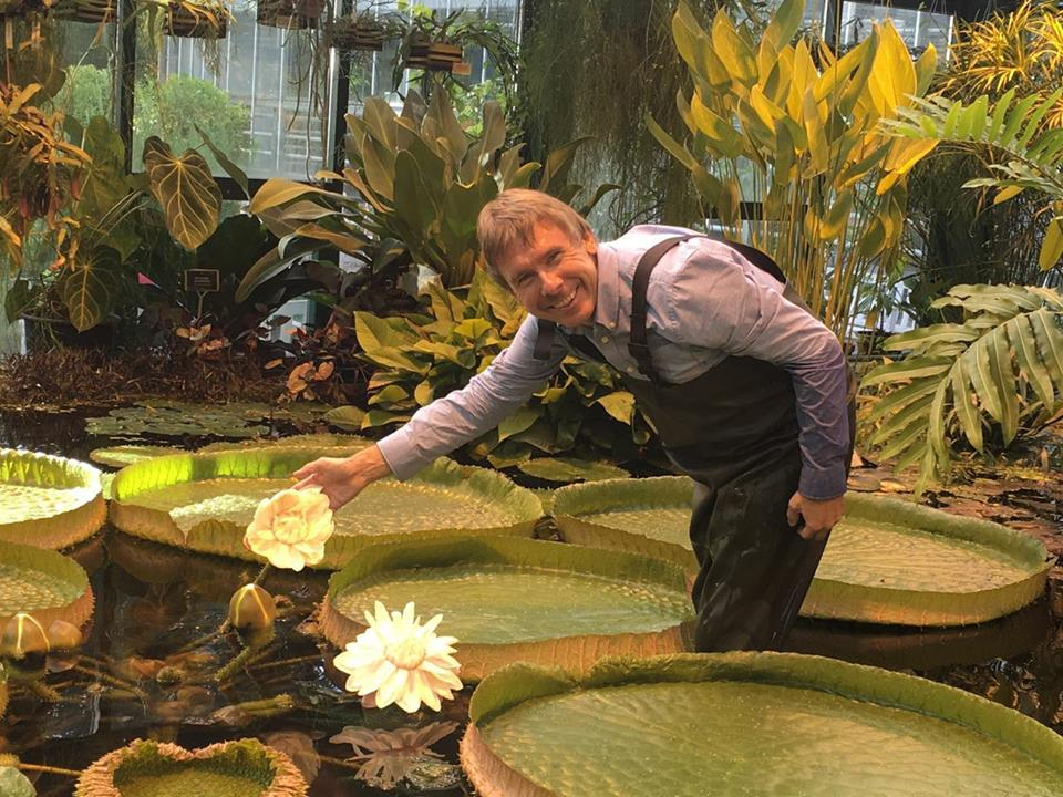 Директор "Аптекарского огорода" Алексей Ретеюм в тропическом бассейне с самыми большими кувшинками в мире викториями амазонскими.